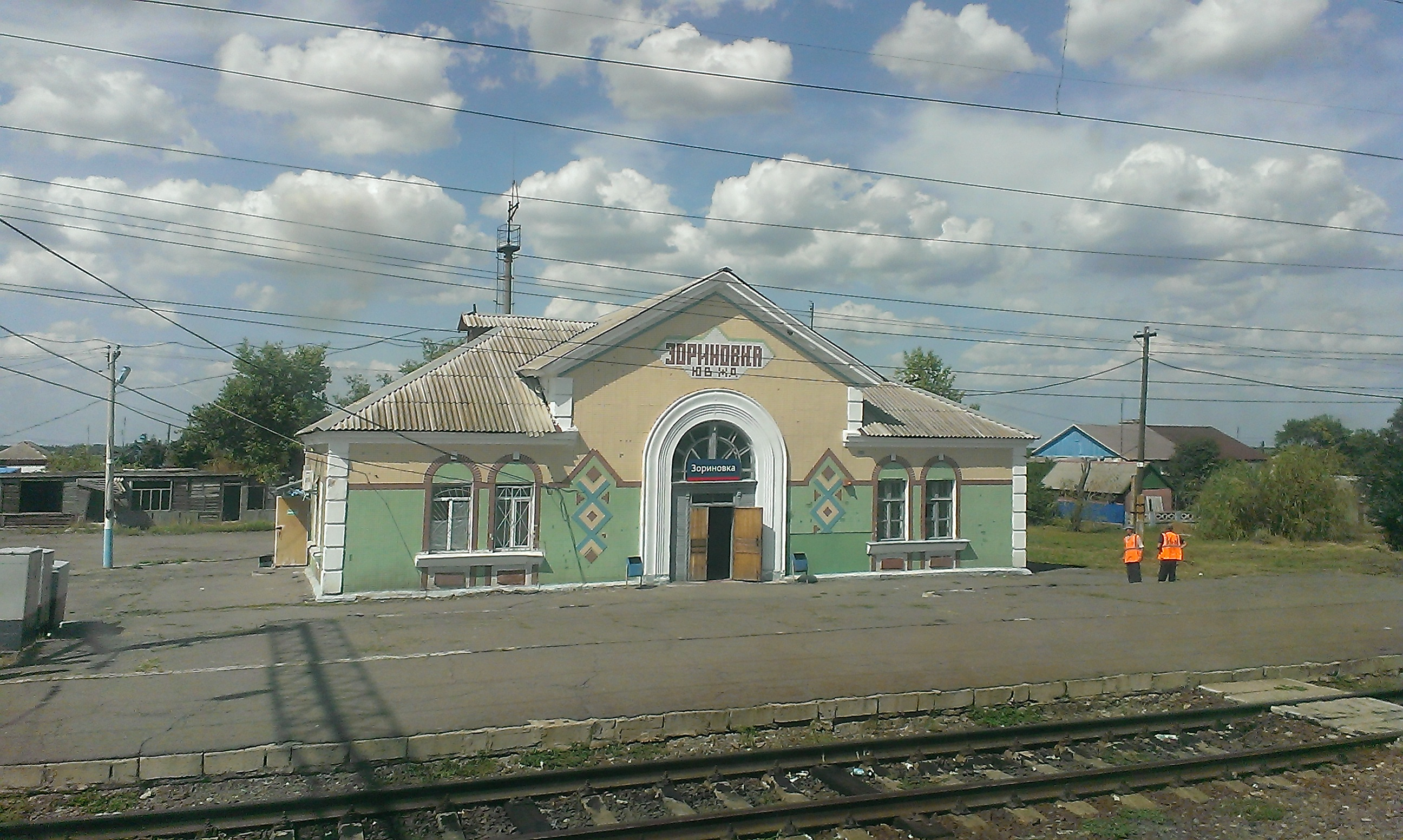 Зориновка